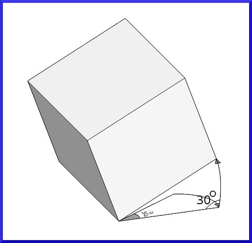 توضيح كيفية دوران المكعب